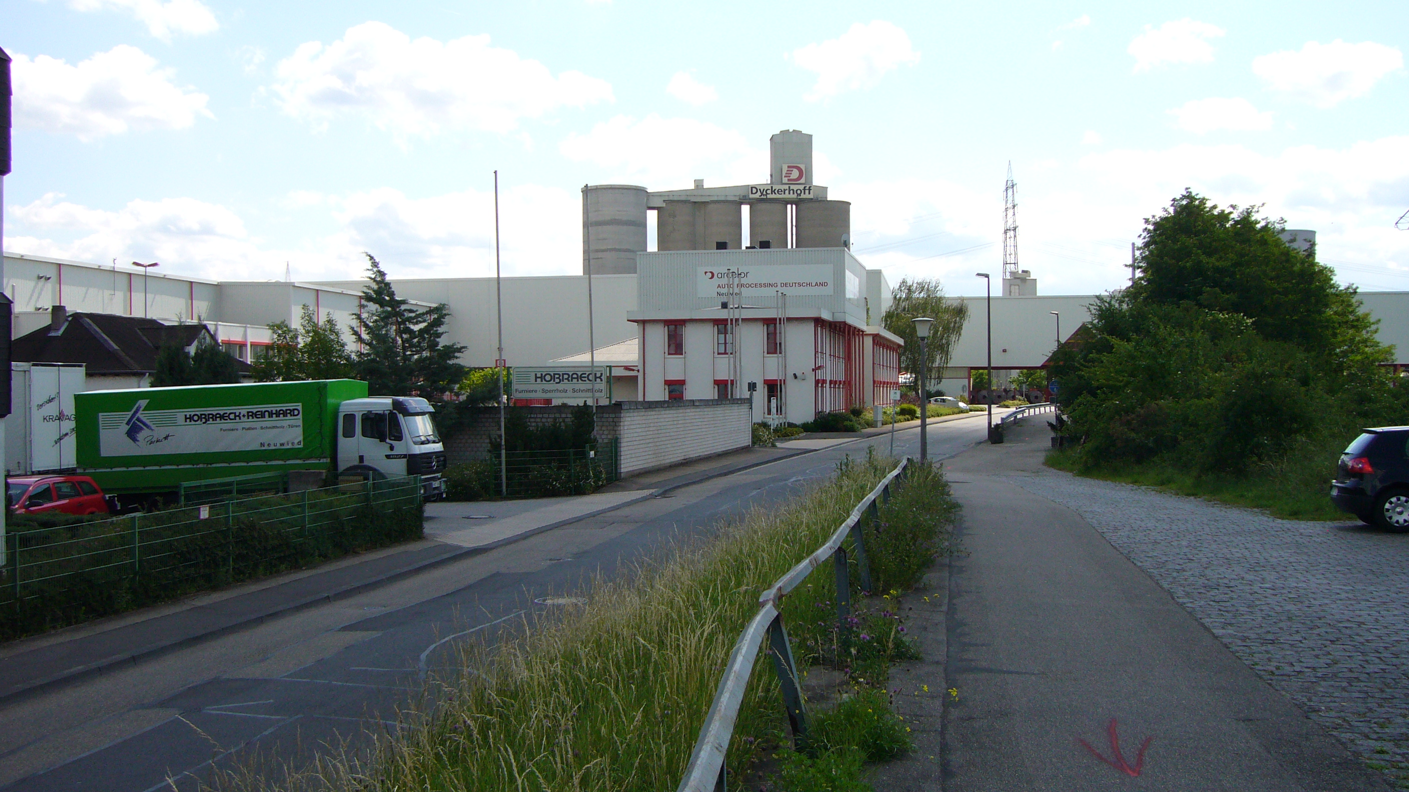 Industrie am Rheinufer Neuwied